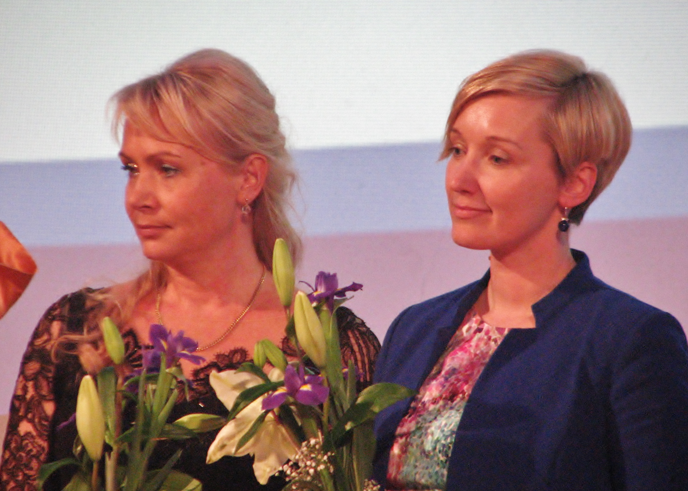 Riina Solman ja Ulla Preeden IRLi suurkogul